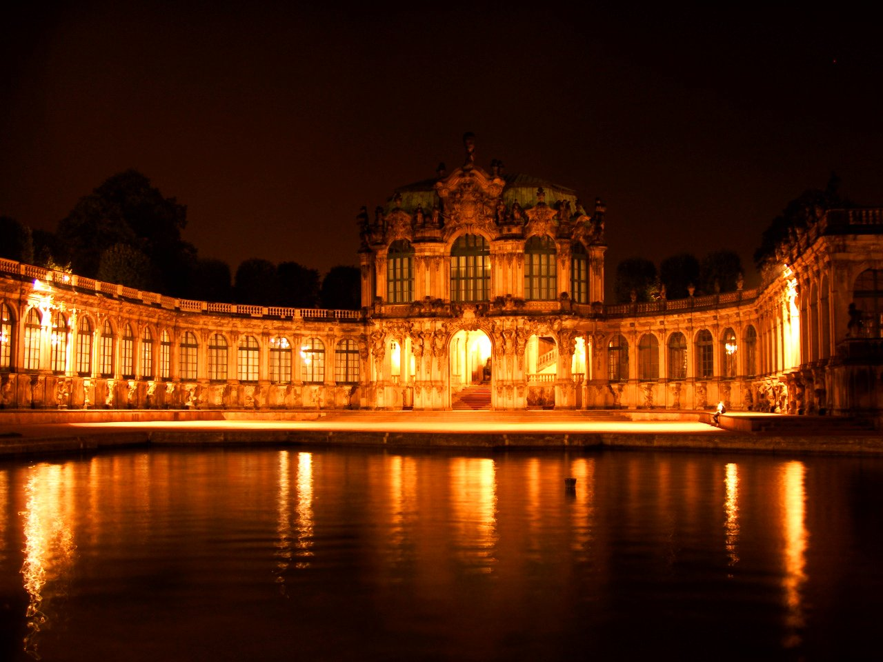 Zwinger de Dresde